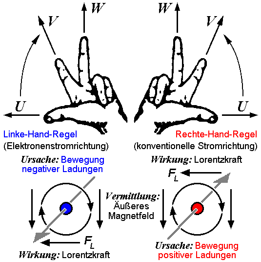 UVW-Regel, recht- und linkshändig